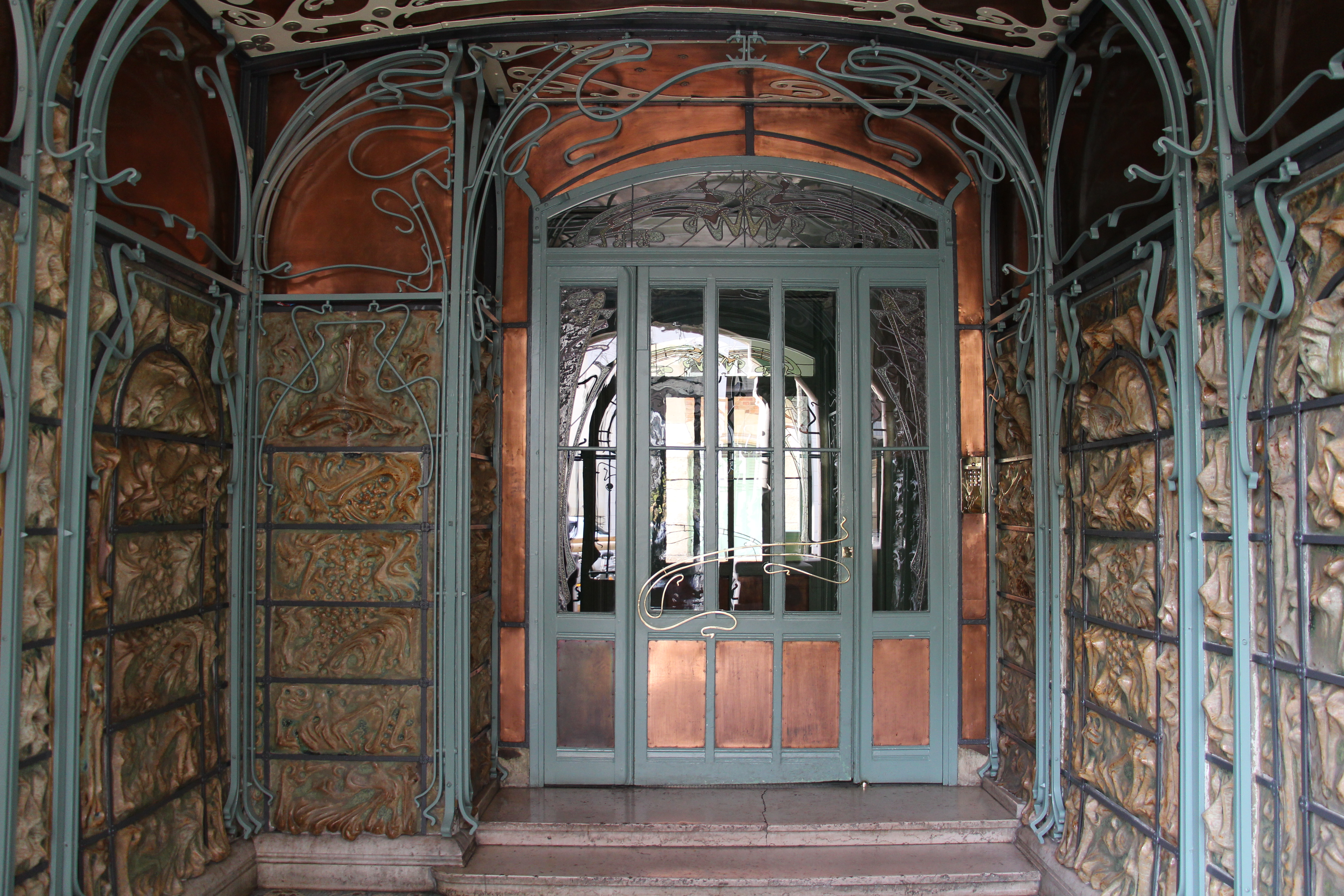 (Auteuil) Rue Jean de la Fontaine Impressive Art Nouveau building. Arch. Hector Guimard 1895-98.